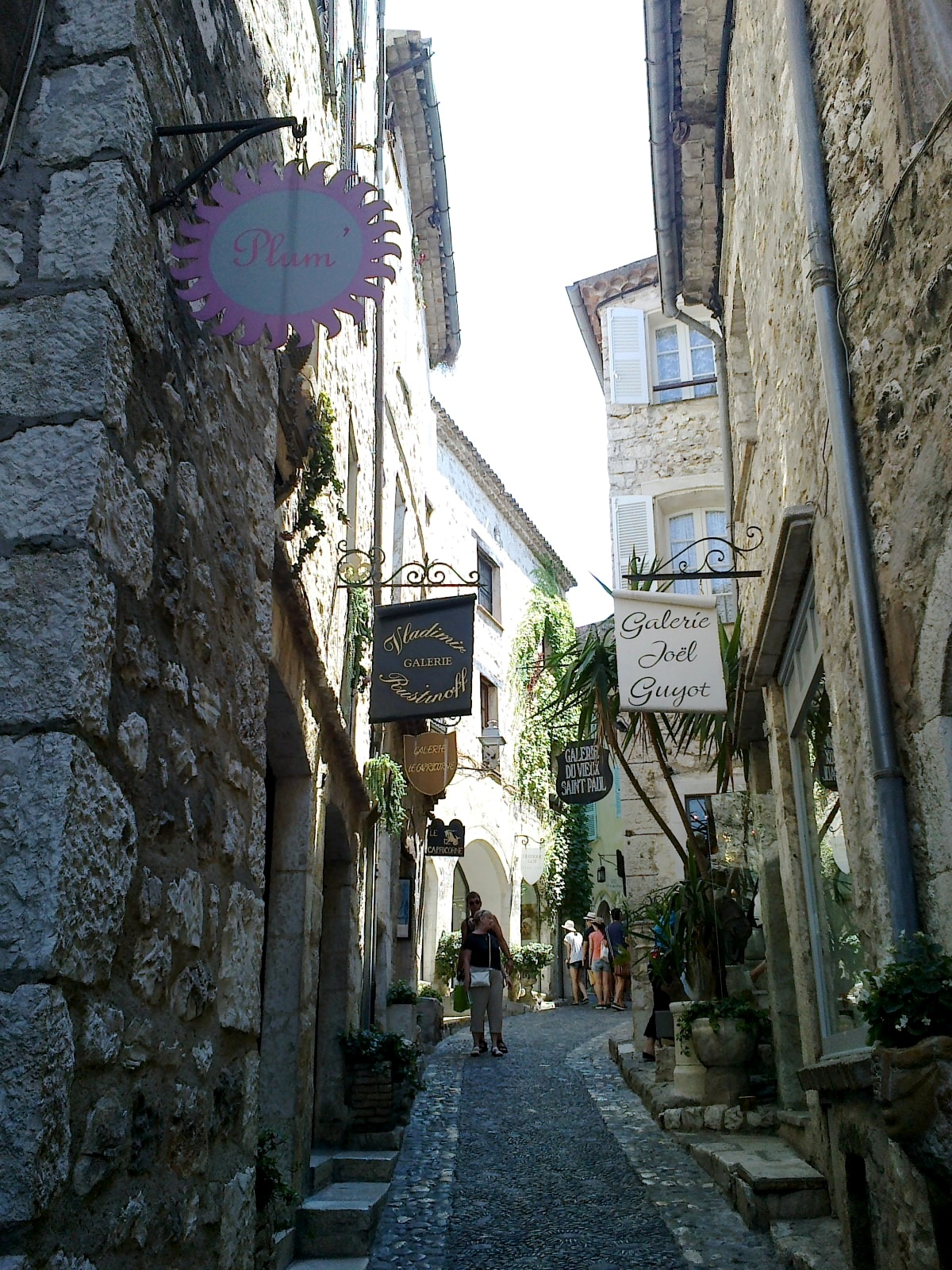 Saint-Paul-De-Vence Porte Nord Rue Grande